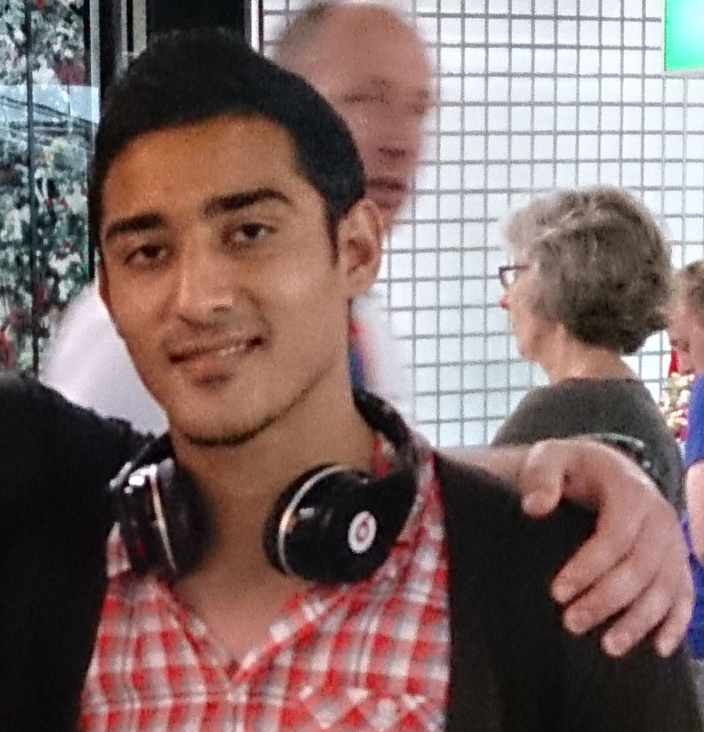 Reza Ghoochannejhad iranian football player